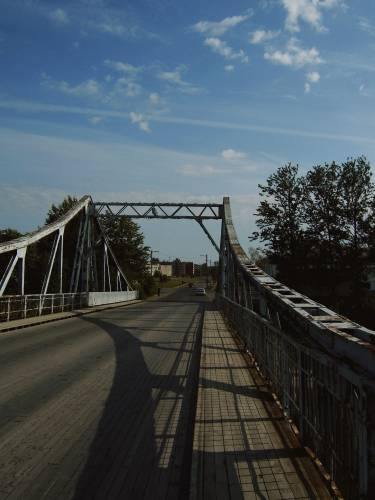 Doppelte drehbare Brücke